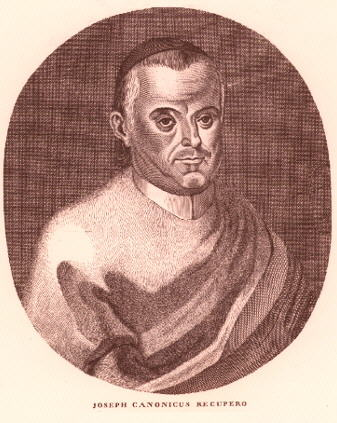 Giuseppe Recupero Canonico